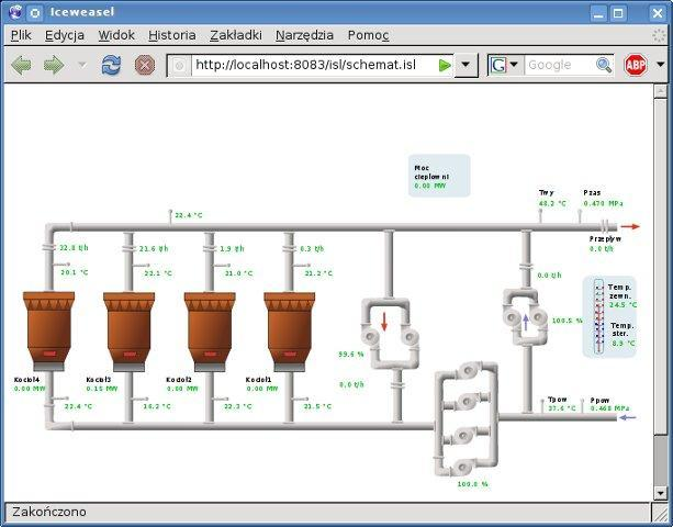 Schemat instalacji grzewczej wyświetlane w Firefoxie.